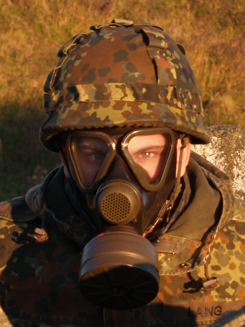 Soldat der deutschen Bundeswehr mit ABC Schutzmaske DA65 und Helm